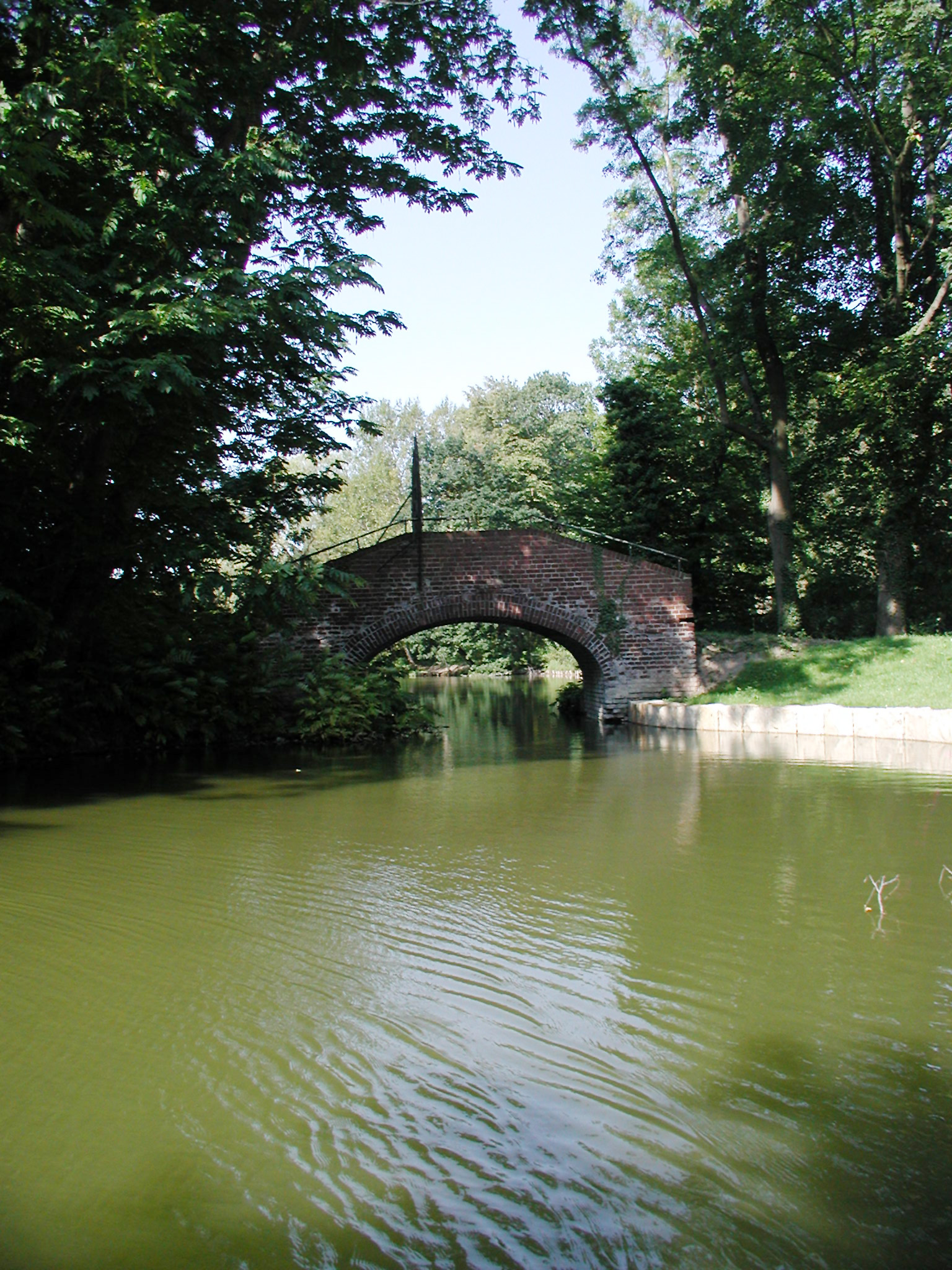 Köln-Lindenthal, Inselbrücke Stadtwaldweiher. Wahrscheinlich die 1896 von R. Jung erwähnte Brücke